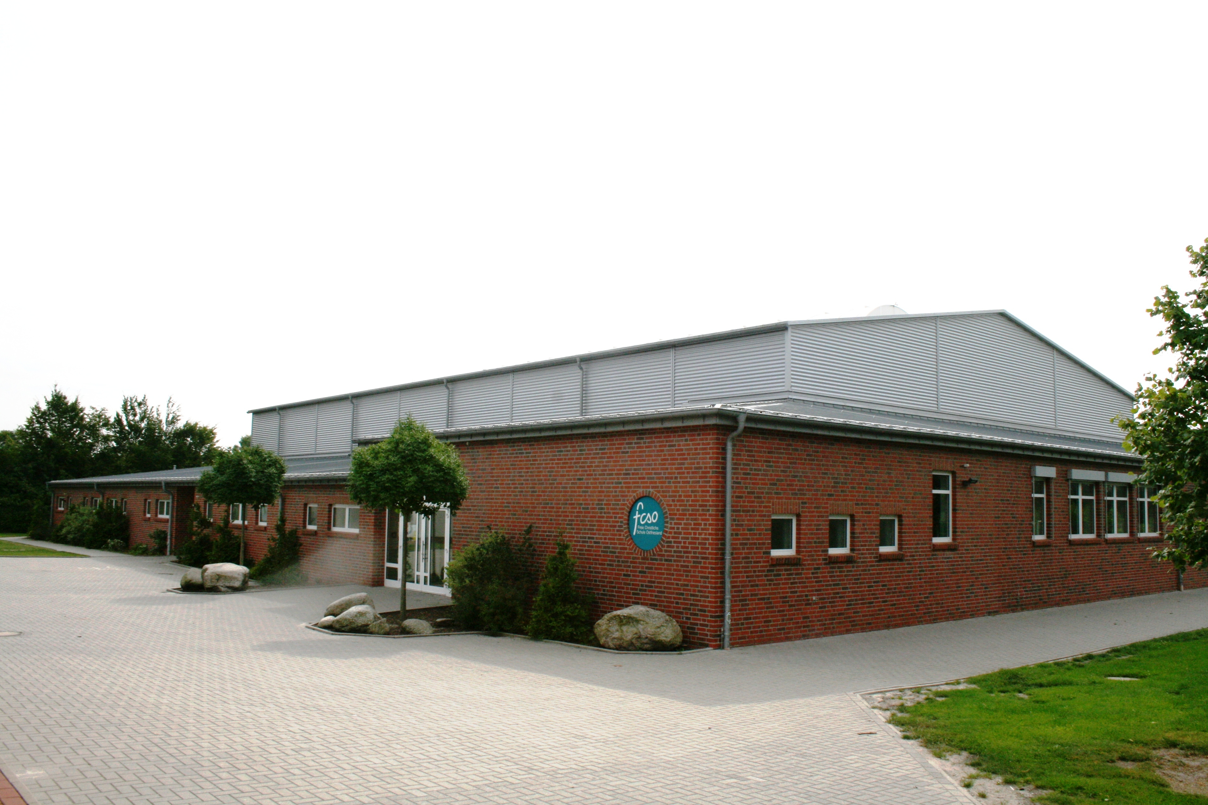 Turnhalle der Freien Christlichen Schule Ostfriesland, Architekt Georg Tjards